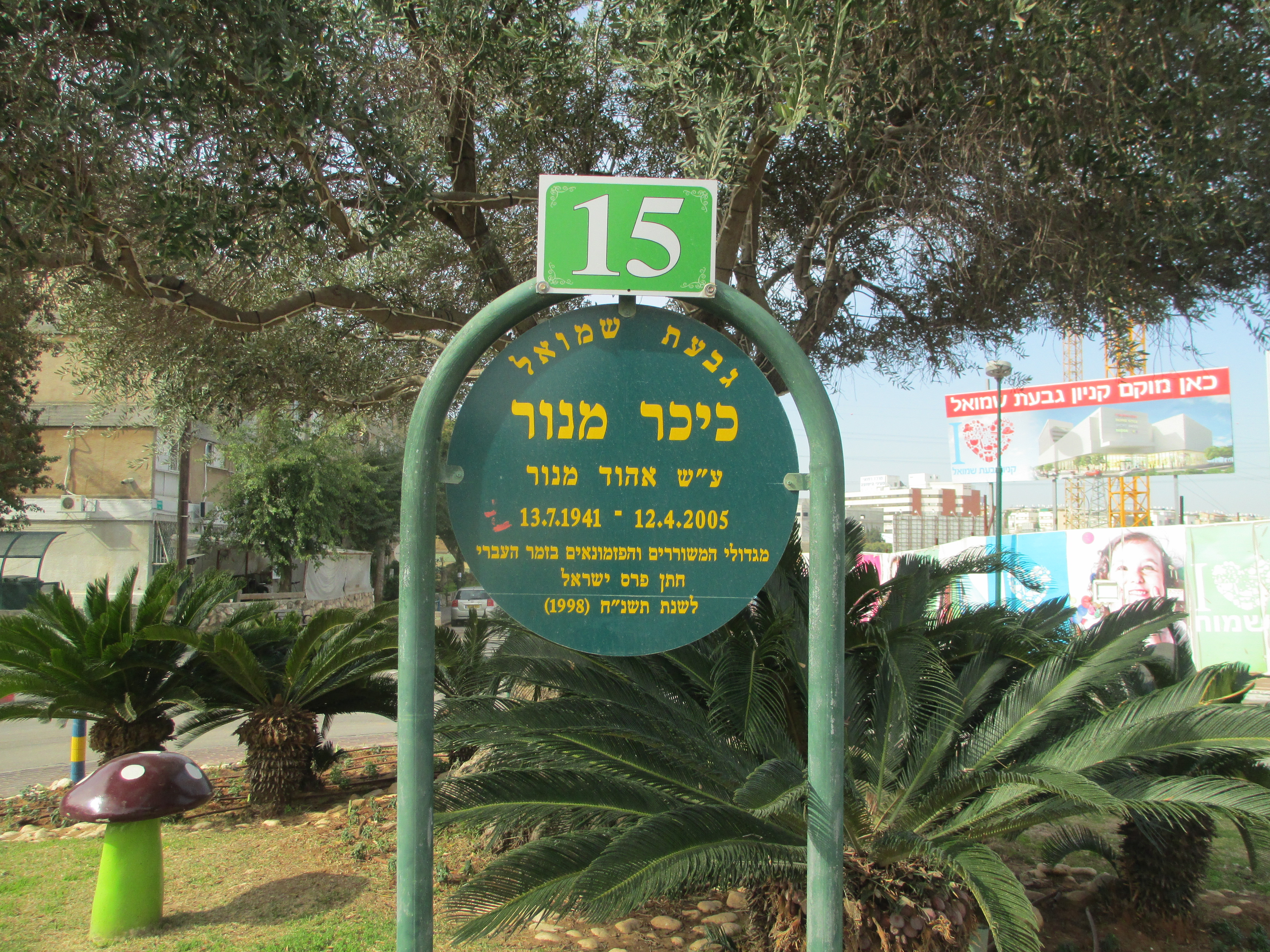 כיכר מנור בגבעת שמואל